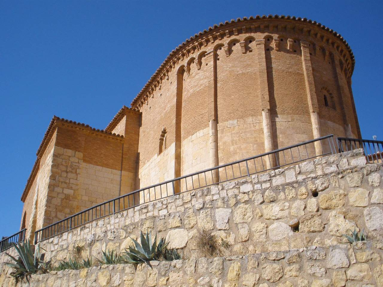 Daroca - Iglesia de San Juan de la Cuesta